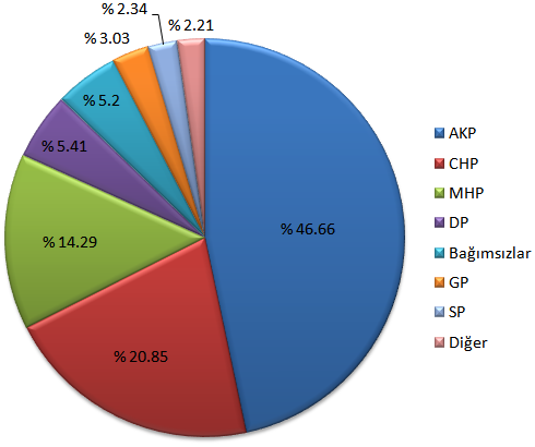 2007 Türkiye Cumhuriyeti Milletvekili Genel Seçimleri - Partilerin aldığı oy oranı